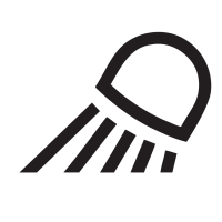 Symbol